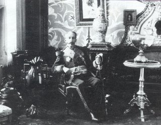 Máximo Tajes (1852 - 1912), político uruguayo, presidente de ese país entre 1886 y 1890.